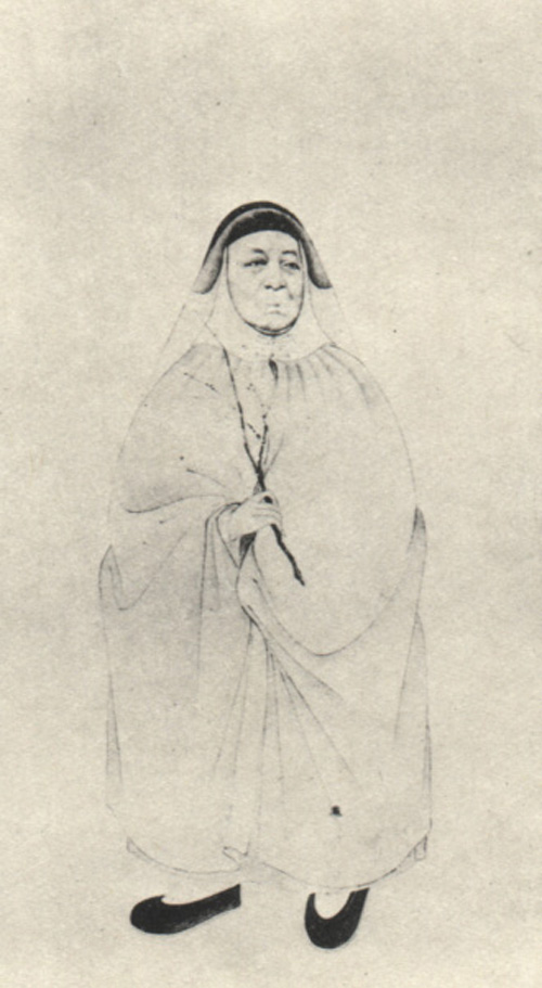 清代学者。Zhang Mingke